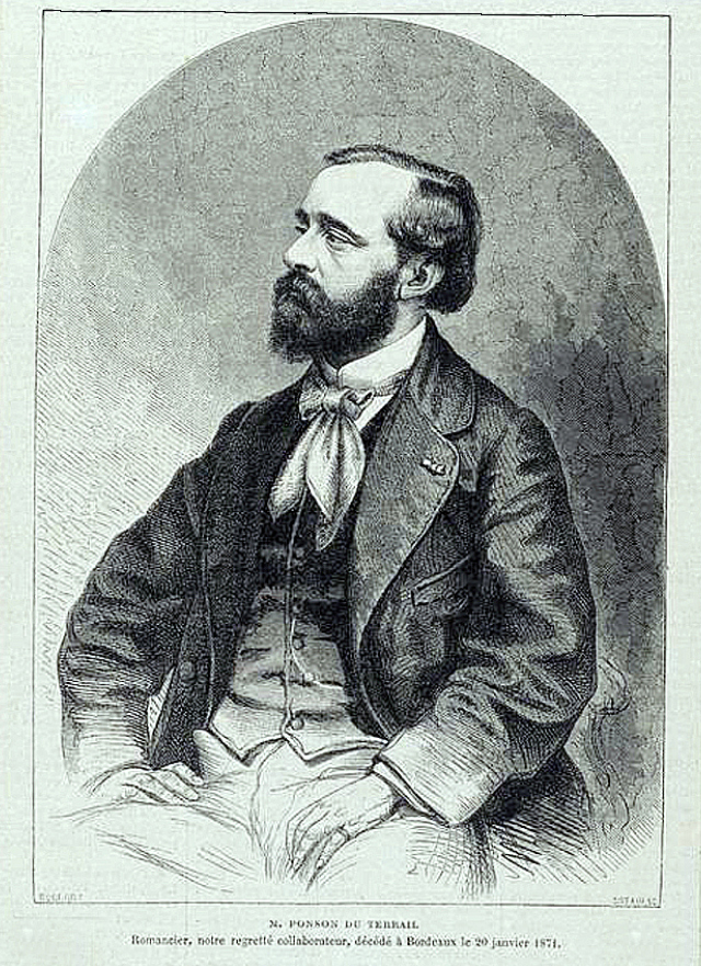 Gravure de Pierre Alexis Ponson du Terrail, parue dans le journal "La Patrie", où il publiait "Rocambole" lors de sa mort en janvier 1871